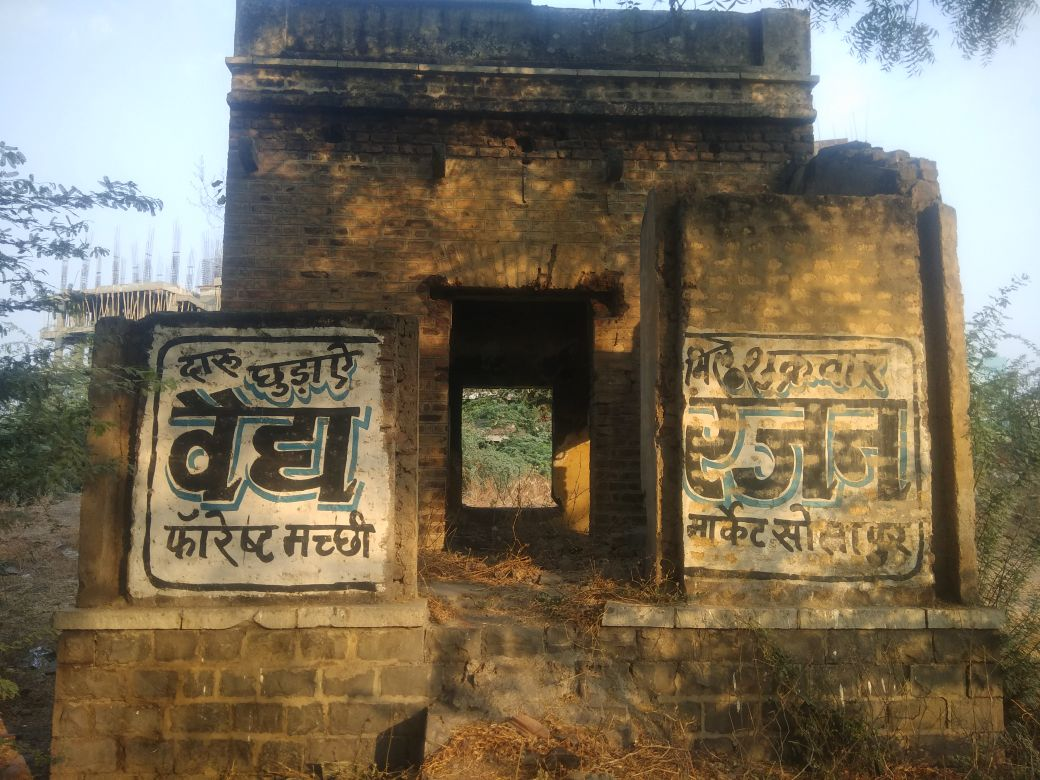 शेळगी नाका